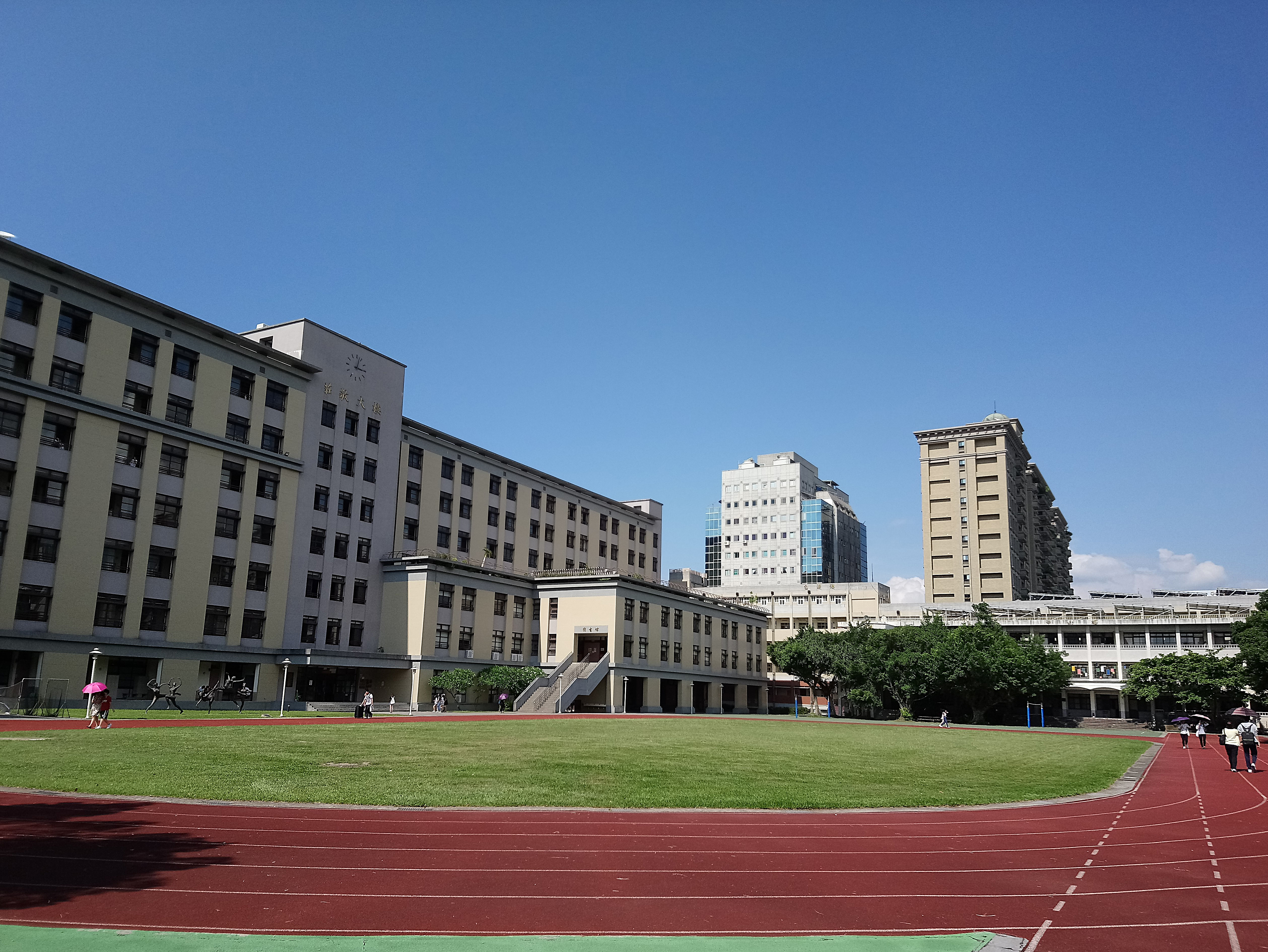 臺北市立中山女子高級中學操場,臺北市中山區朱厝崙次分區力行里